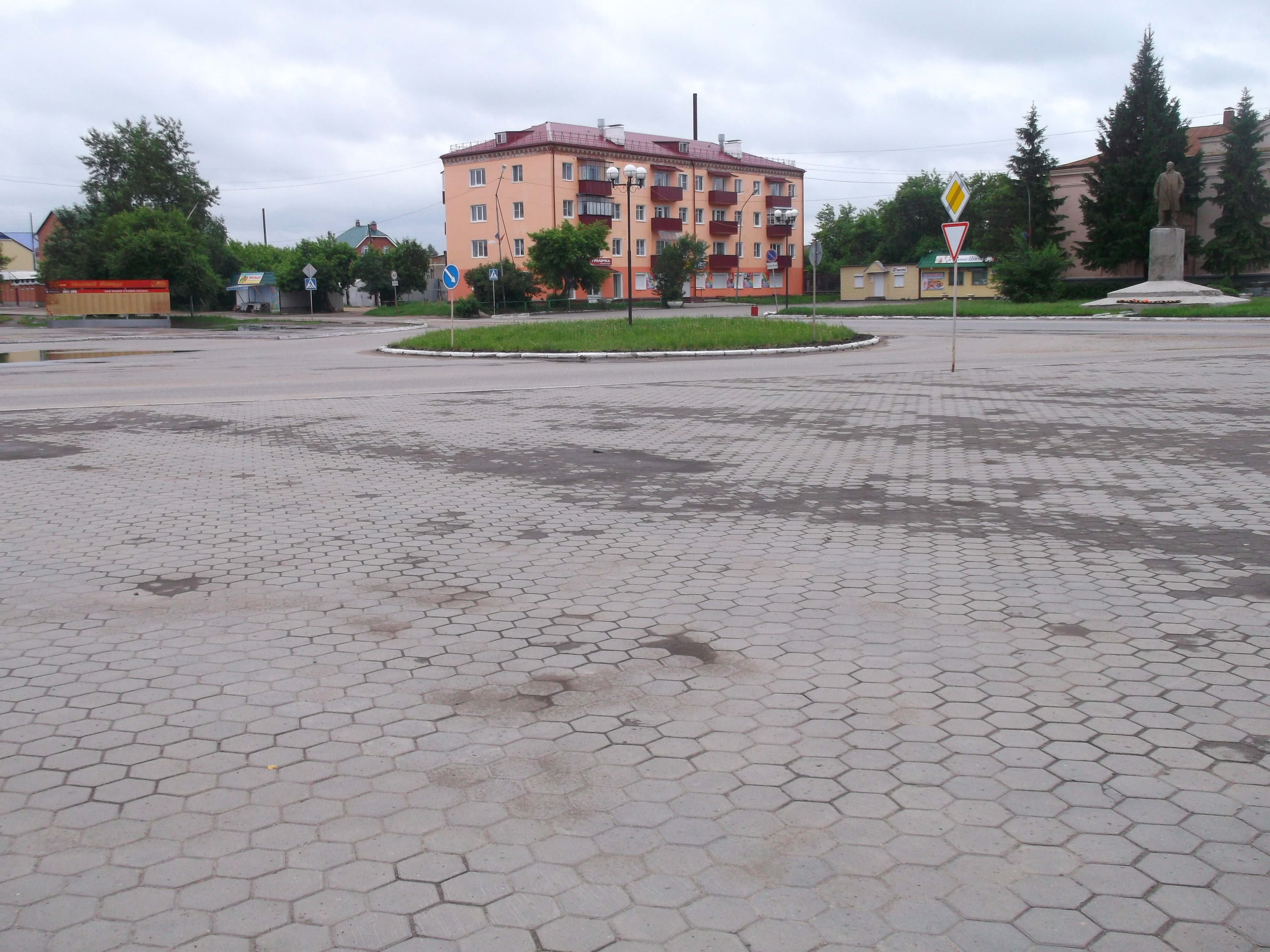 г. Катайск